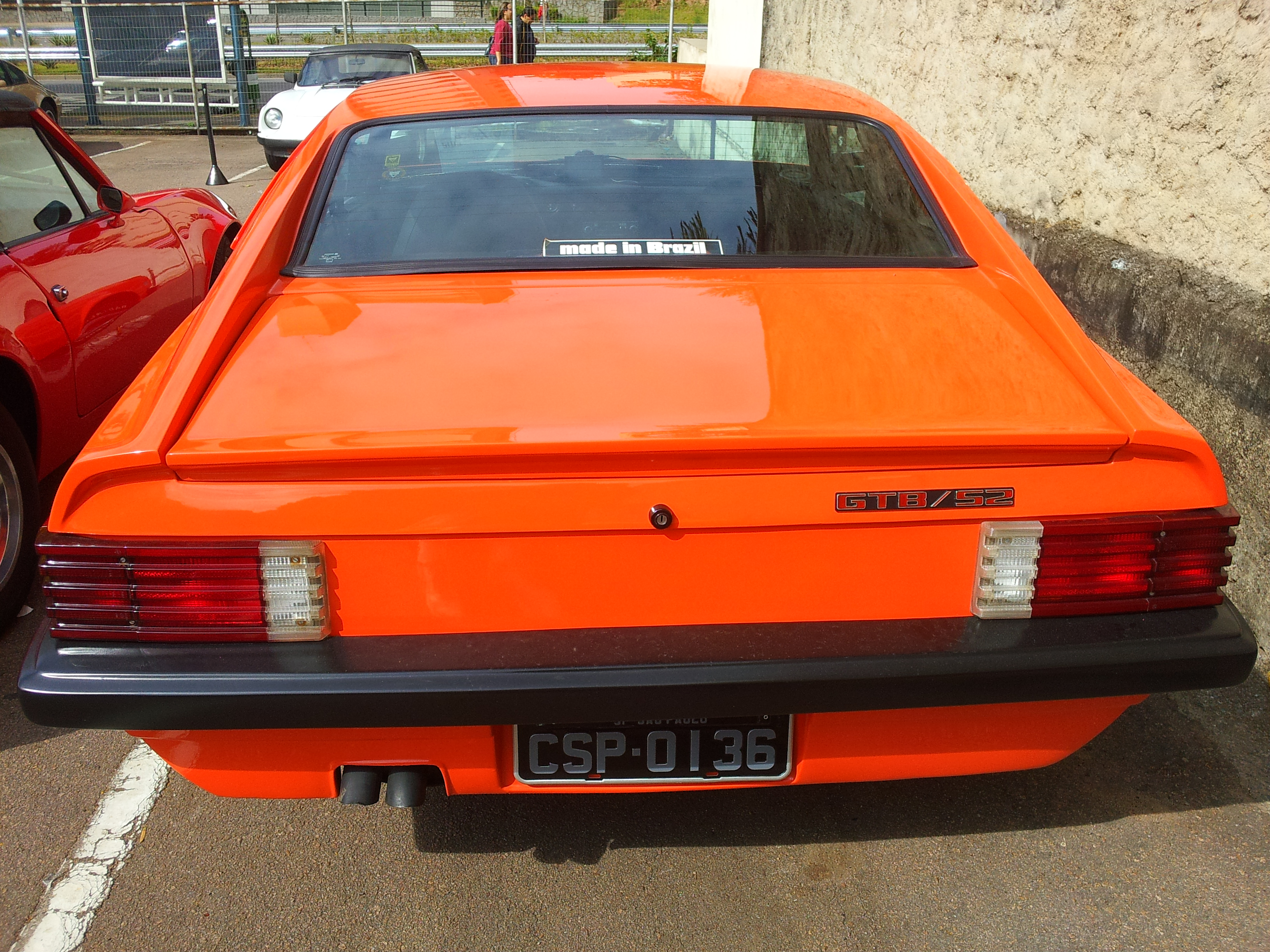 5º encontro Puma Jundiaí 2012_"Bulevar Beco Fino"_Av.Nove de Julho.